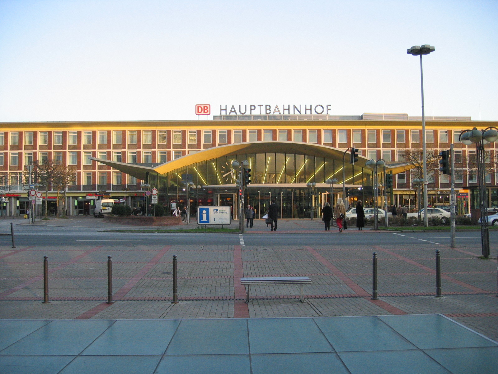 Bochum Hauptbahnhof, Nordfassade